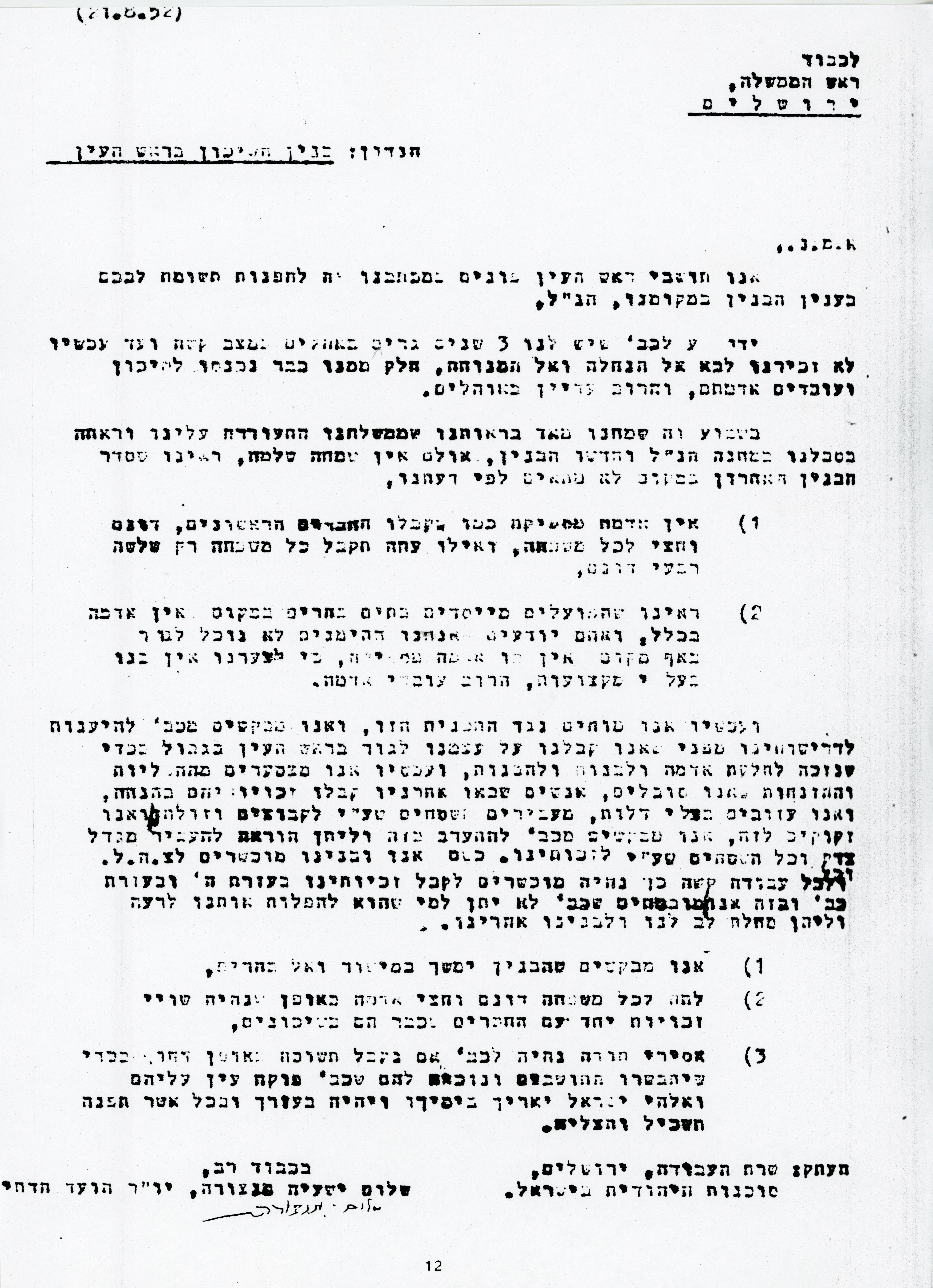 מכתב ששוגר לראש הממשלה מאת חברי הוועד המקומי במחנה ראש העין, עליו חתום יו"ר הוועד הדתי, שלום ישעיה מנצורה. במכתב מציין הרב את האפליה שחווים עולי תימן הגרים באוהלים במחנה כ- 3 שנים, לעומת עולים אשר כבר קיבלו שטח אדמה גדול ואף שוכנו בשיכוני קבע באזורים חקלאיים ולא הרריים כפי שמיועד לעולים שעדיין לא שוכנו. מידות: 30*21 ס"מ (דף A4) חומר: נייר באדיבות מוזיאון מורשת יהדות תימן ומורשת העיר ראש העין, ארכיון פרטי המנוהל על ידי נסים, בנו של הרב שלום מנצורה.